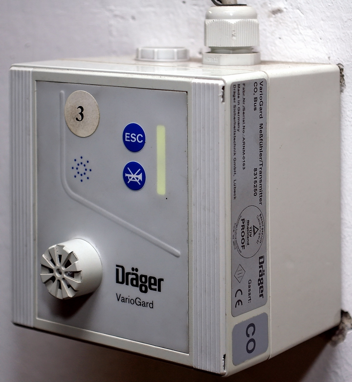 CO-Wächter von Dräger, Montageort: Tiefgarage für Kraftfahrzeuge